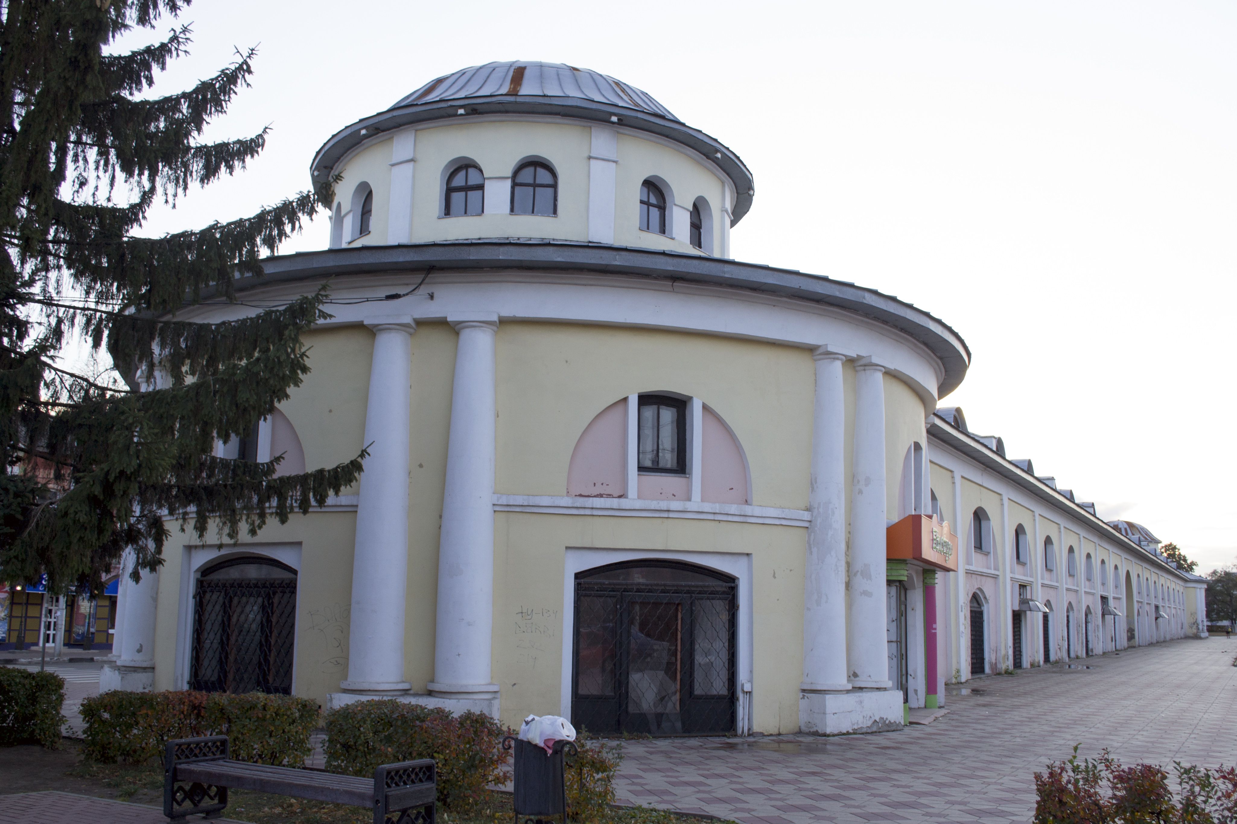 Хлебные ряды (городские и торговые ряды) (Рязанская область, Рязань, Ленина площадь (Краснорядская улица, Кольцова улица))